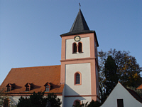 Blick auf die Kilianskirche in Hagenbüchach